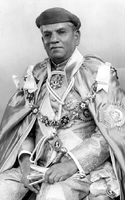 Sayaji Rao Gaekwad III